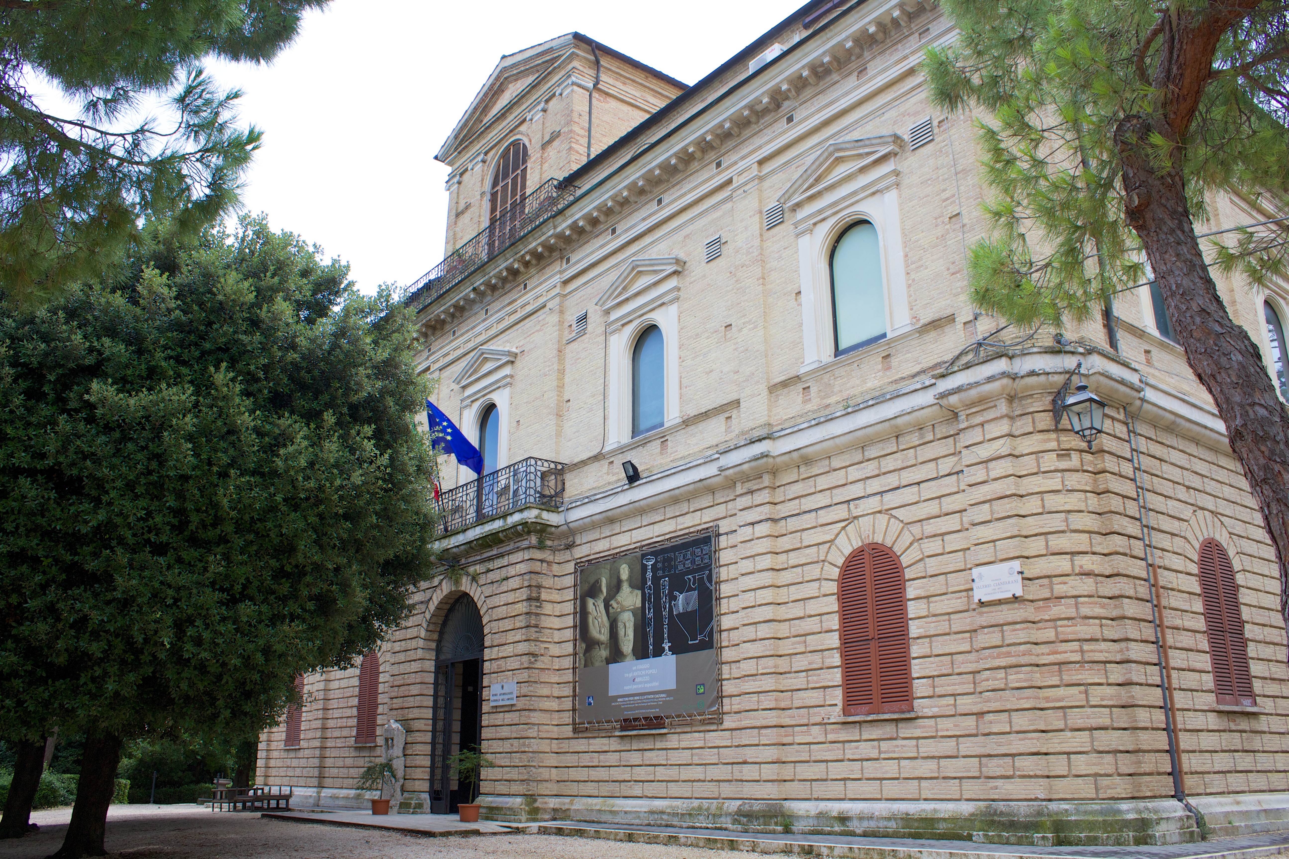 Museo archeologico nazionale d'Abruzzo, Chieti